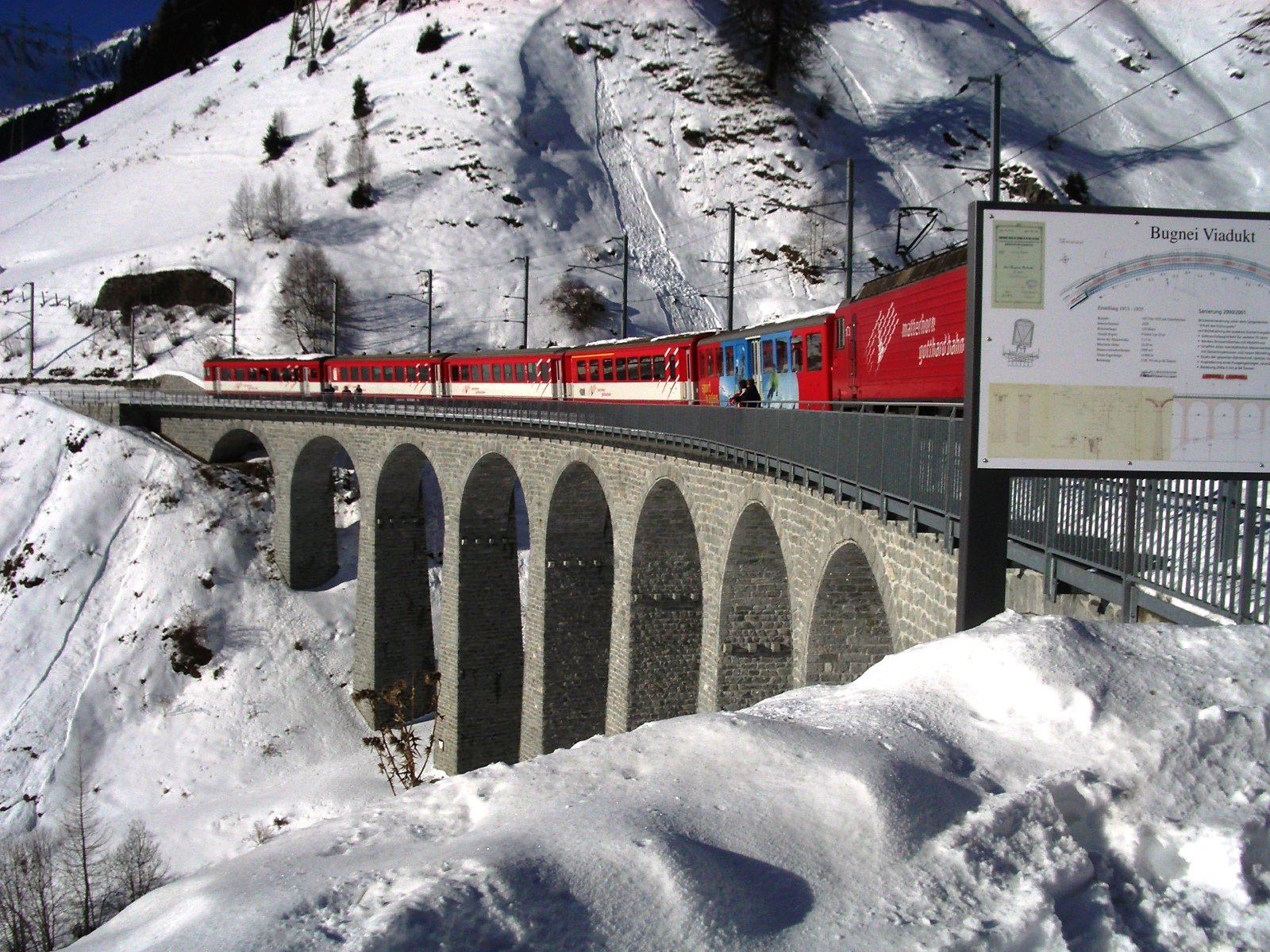 Sedrun, Switzerland self-made, December 2005